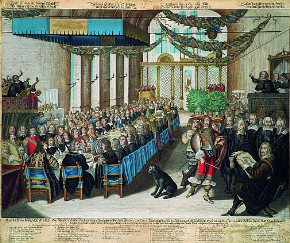 etching "Das Friedensmahl des Kurfürsten Karl Gustav von der Pfalz im Nürnberger Rathaus", 25 September 1649, size: 22,8 x 27,2 in. 58 x 69 cm.